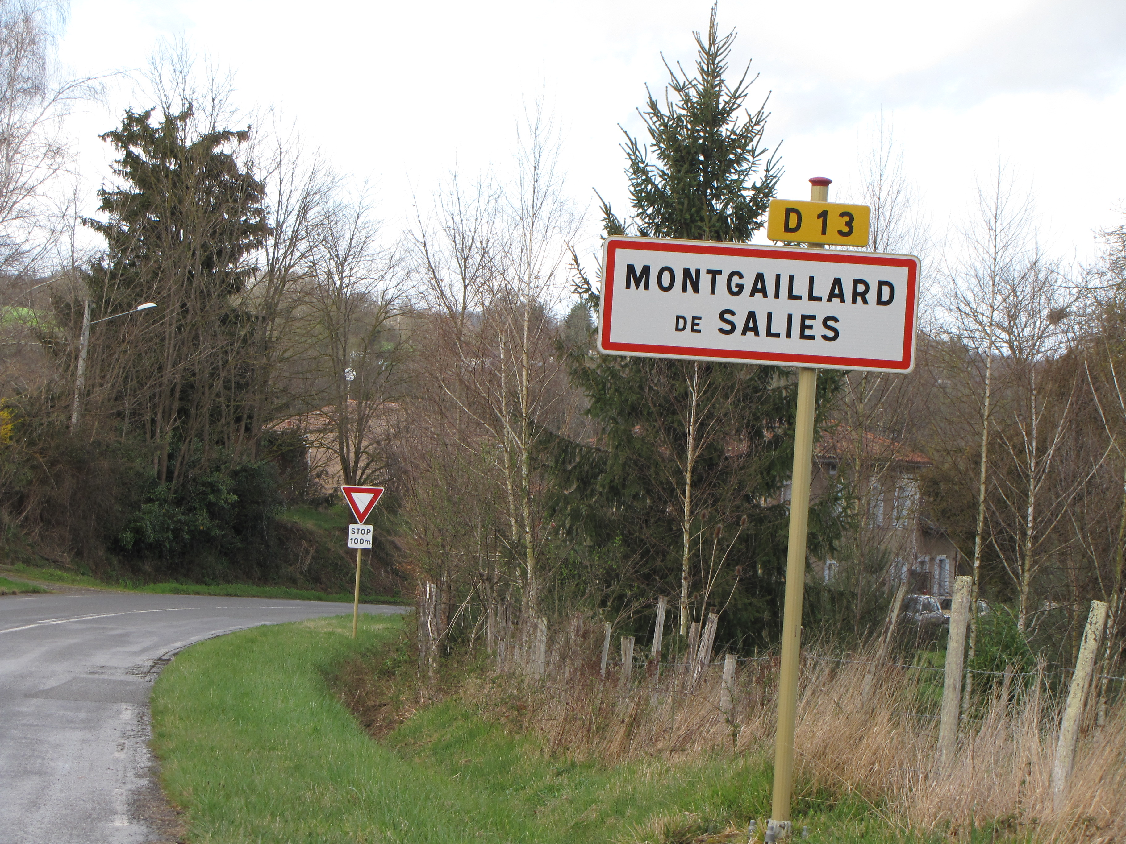 Montastruc-de-Salies